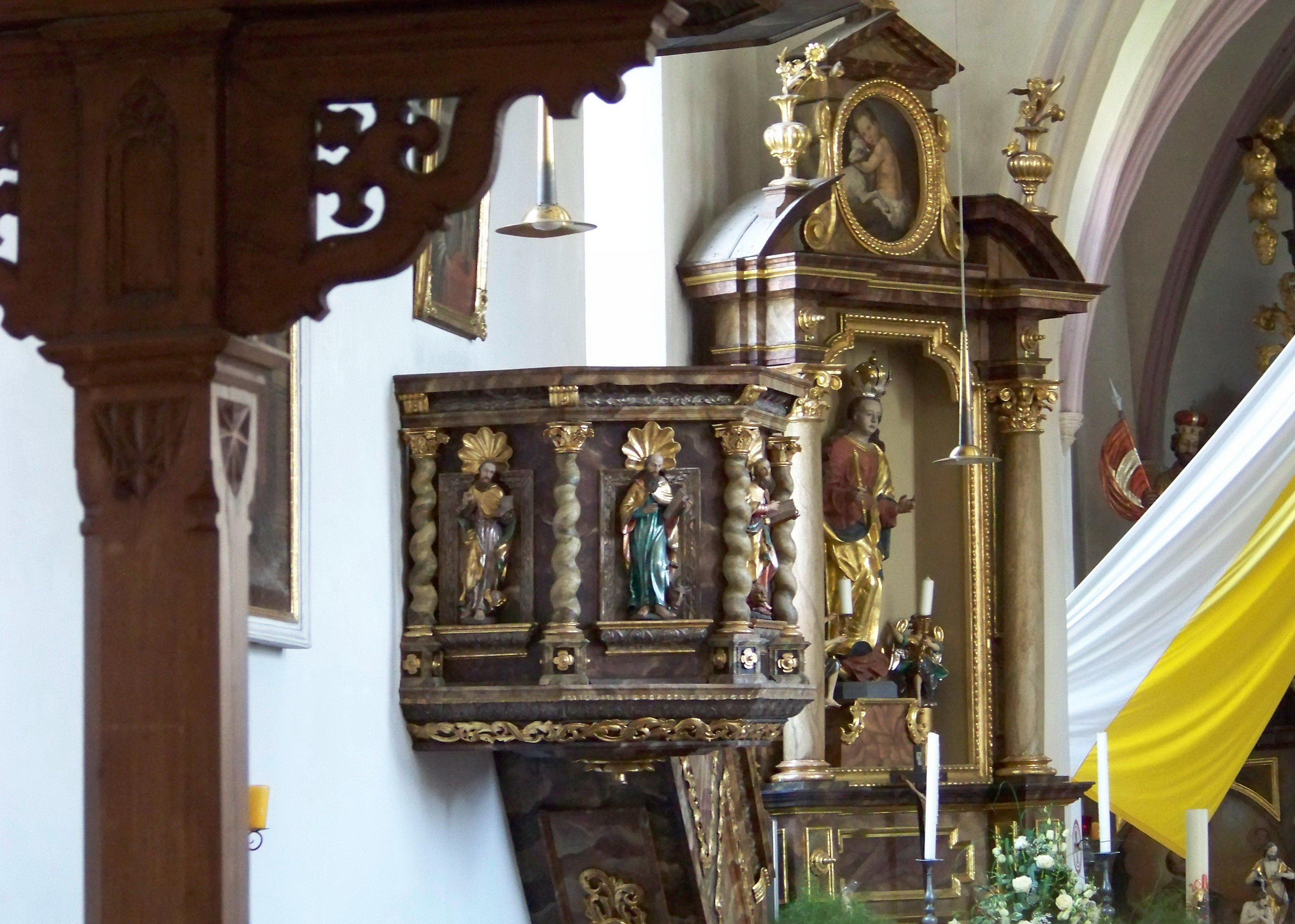 Altdorf bei Landshut. Eugenbach, Kichweg 21. Katholische Pfarrkirche St. Georg. Saalbau aus dem 10. Jahrhundert, westliche Erweiterung 13./14. Jahrhundert. Linker Seitenaltar St. Maria. Barocke Kanzel um 1700 mit Figuren der vier Evangelisten zwischen gewundenen Säulchen.